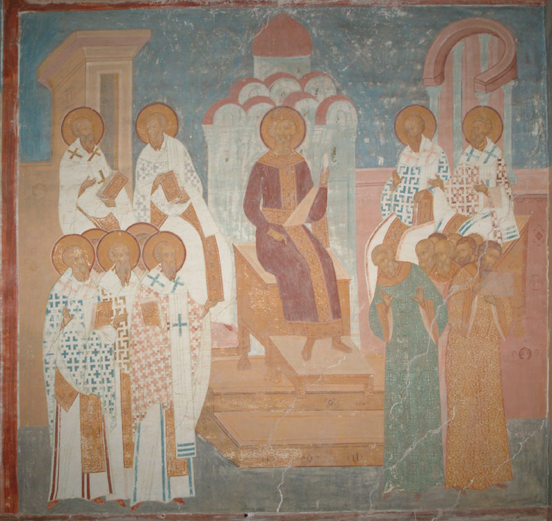 Пятый вселенский собор – Второй Константинопольский, проходил в 553 году в Константинополе при императоре Юстиниане Первом. Собор был созван по поводу сочинения трех учителей сирийской церкви, Феодора Мопсуецкого, Феодорита Кирского и Ивы Едесского, в которых ясно выражались несторианские заблуждения. На соборе присутствовали 165 епископов, которые осудили эти сочинения и Феодора Мопсуецкого, который отказался раскаяться и подтвердили осуждение ереси Нестория и Евтихия. Феодорит Кирский и Ива Едесский были помилованы, так как они отказались от своих ложных взглядов.